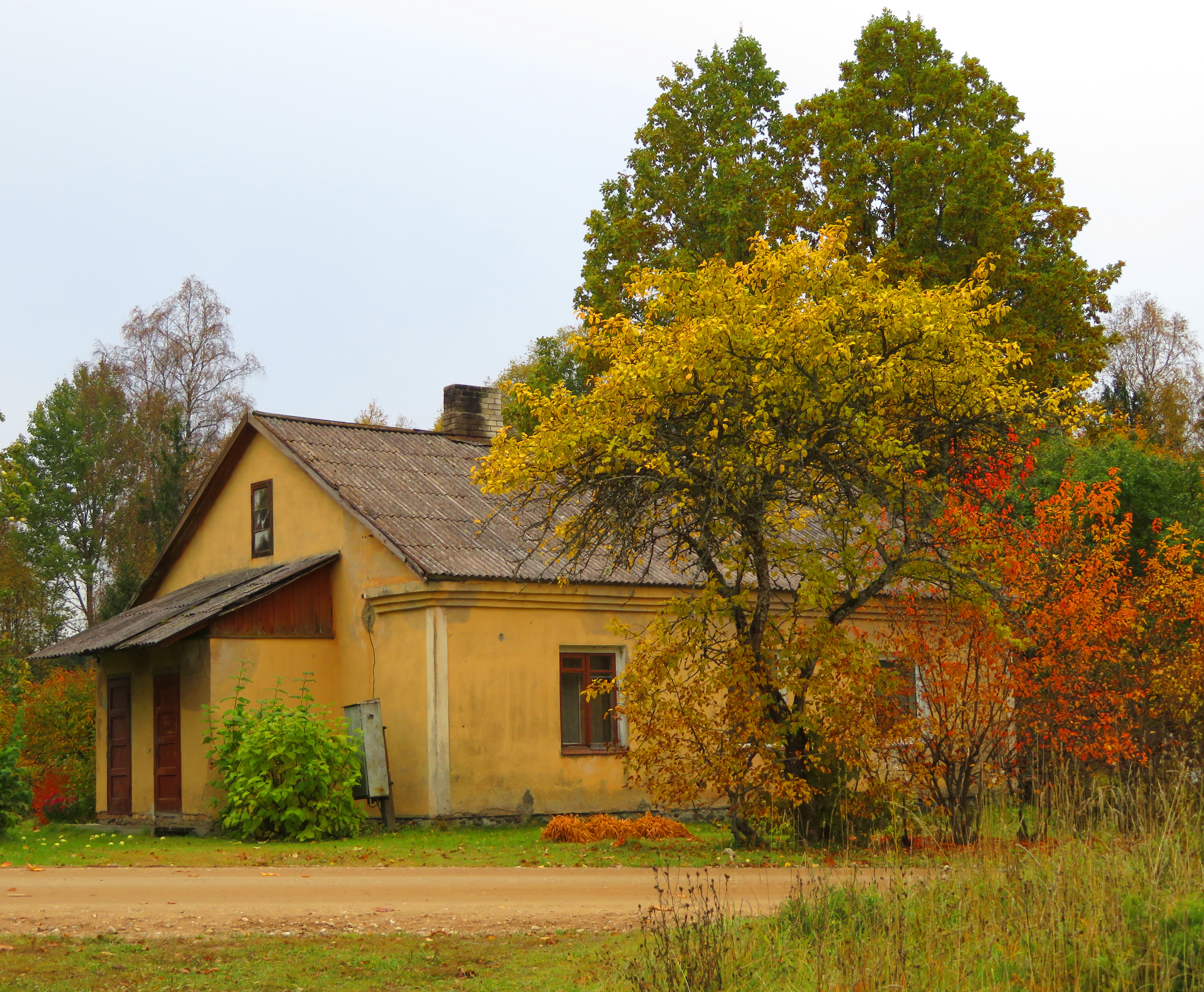 Meļļu stacijas ēka